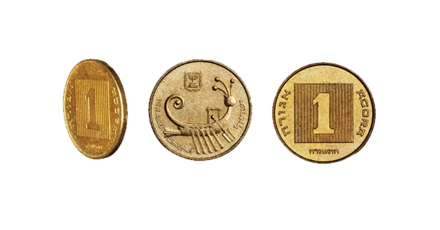 Израильская агора 1985 года выпуска. Гурт аверс и реверс.